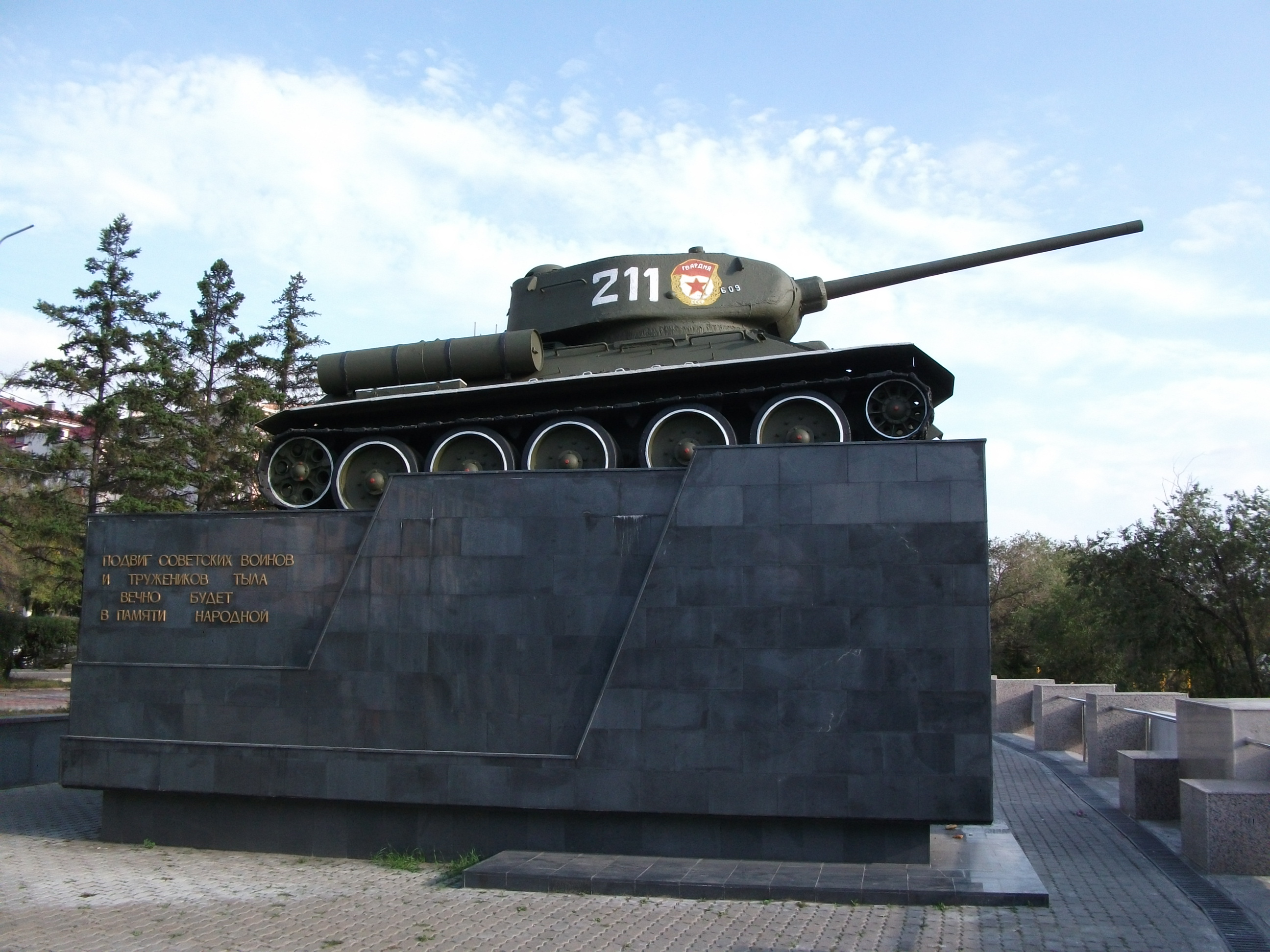 Танк, установленный в честь воинов-земляков, погибших в годы Великой Отечественной войны: проспект Победы, Улан-Удэ, Бурятия